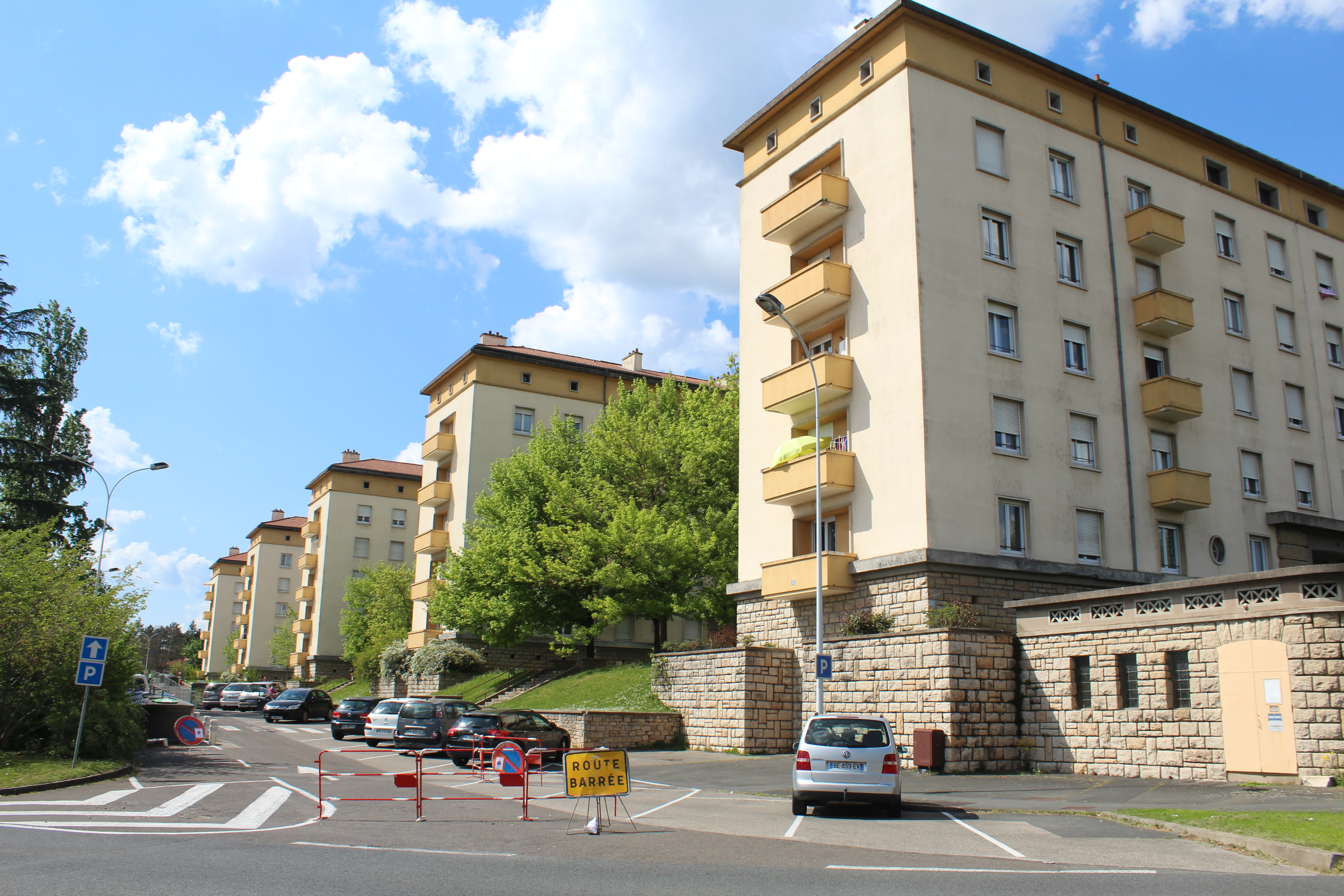 Immeubles, rue Alfred Lacroix, quartier de Bioux, Mâcon.